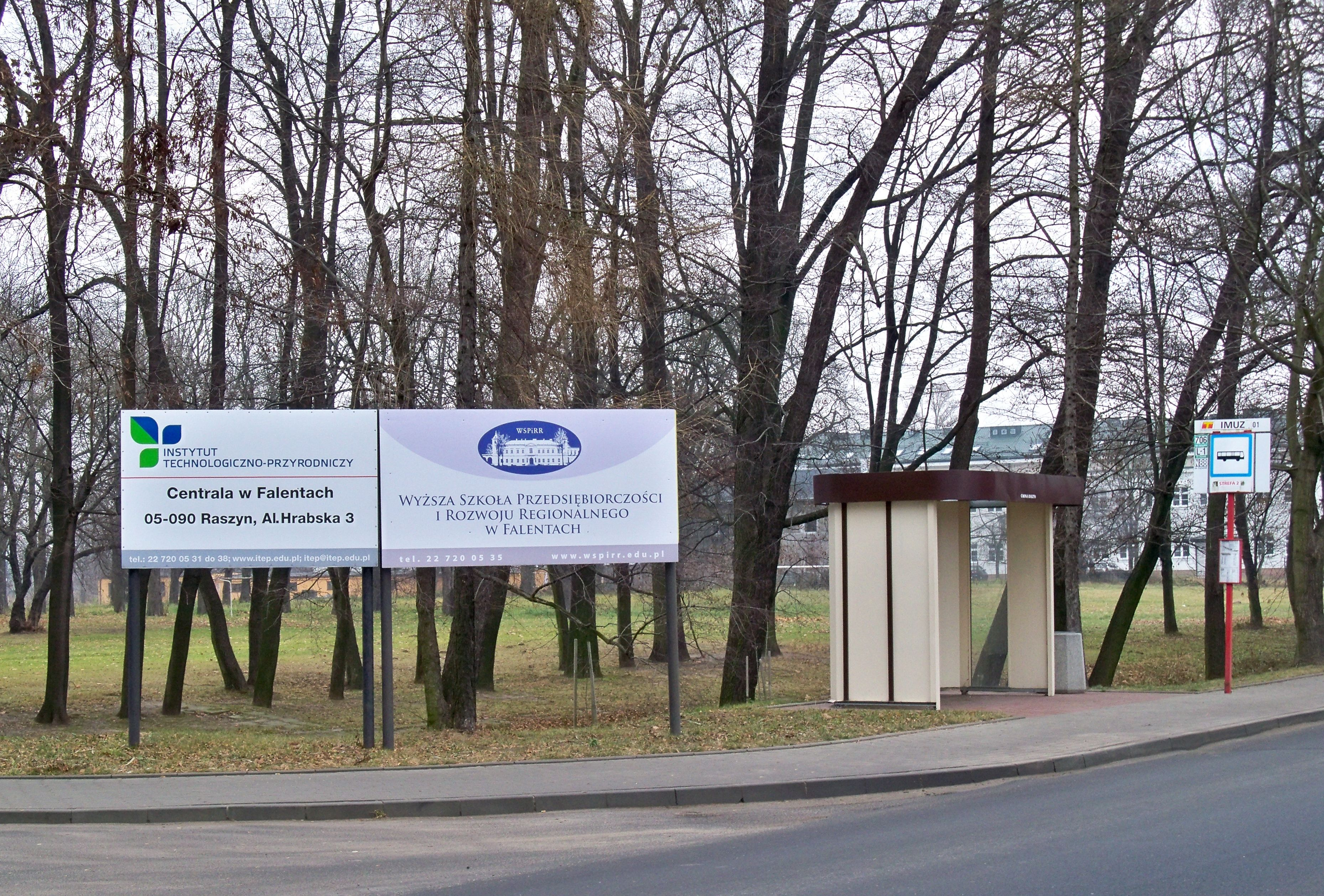 Przystanek ZTM w Warszawie IMUZ (Falenty) przy wjeździe do ITP w Falentach